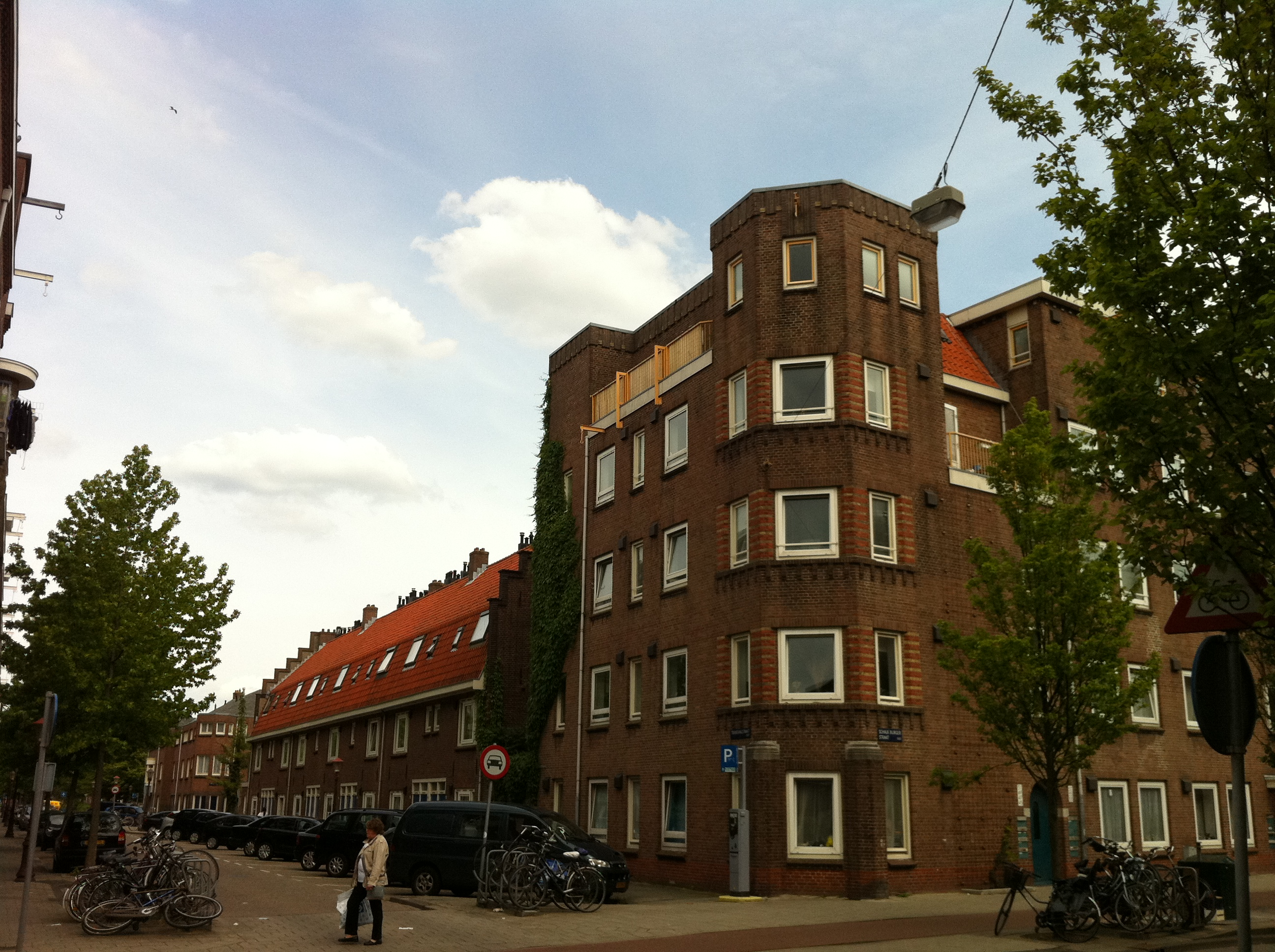 Complex gemeentewoningen in Transvaalbuurt Amsterdam van architect Jan Gratama aan de Schalk Burgerstraat, hoek Transvaalstraat